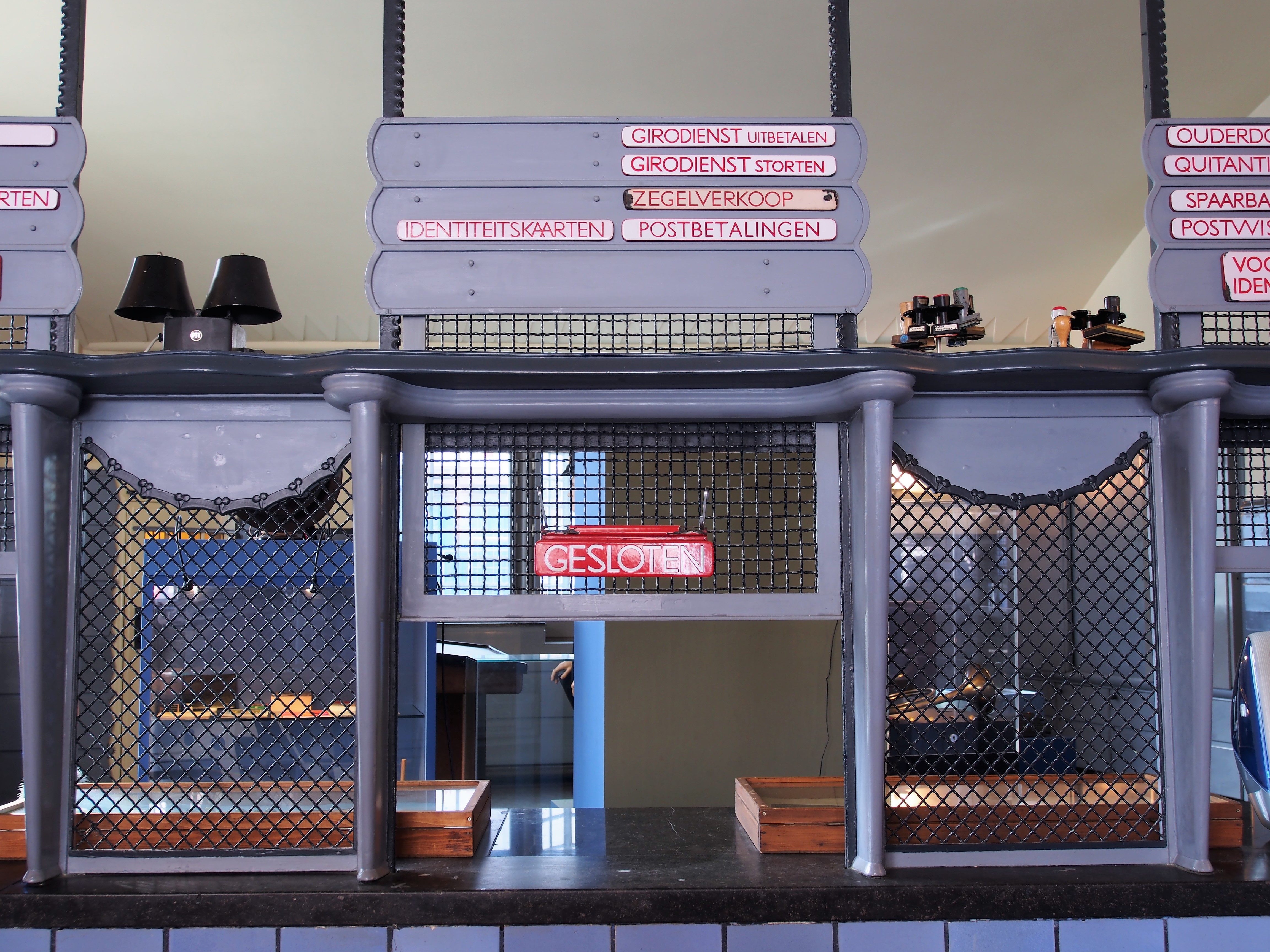 Loket. Foto genomen in of rond het museum.